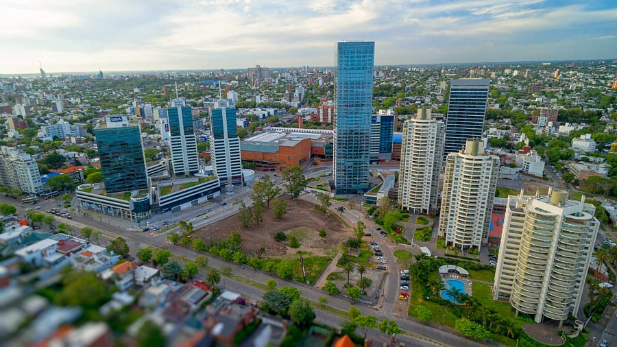 Деловой район Монтевидео